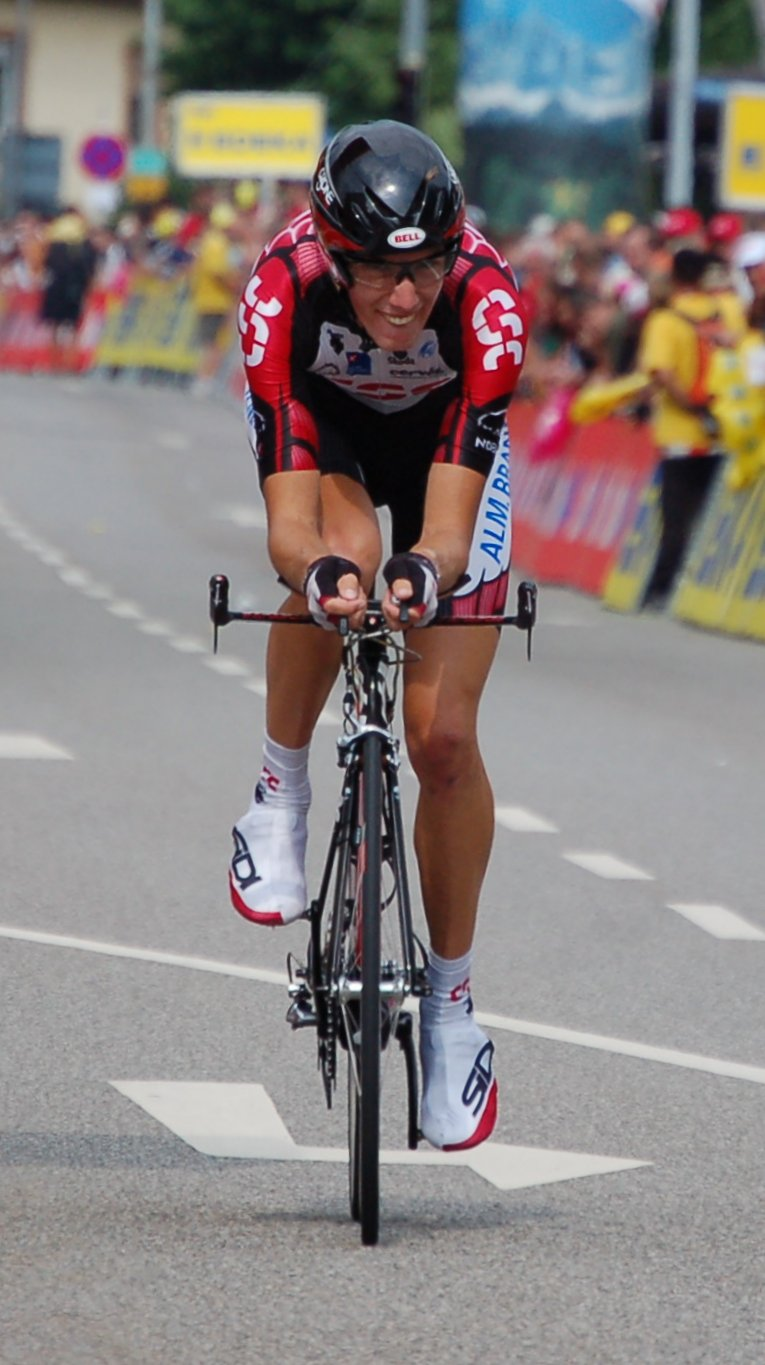 Andy Schleck beim Einzelzeitfahren der Deutschland Tour 2006